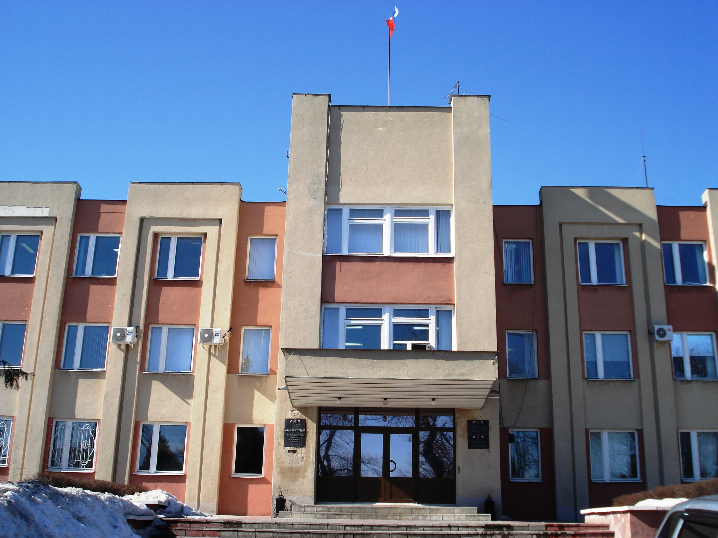 Здание администрации Новоусманского района